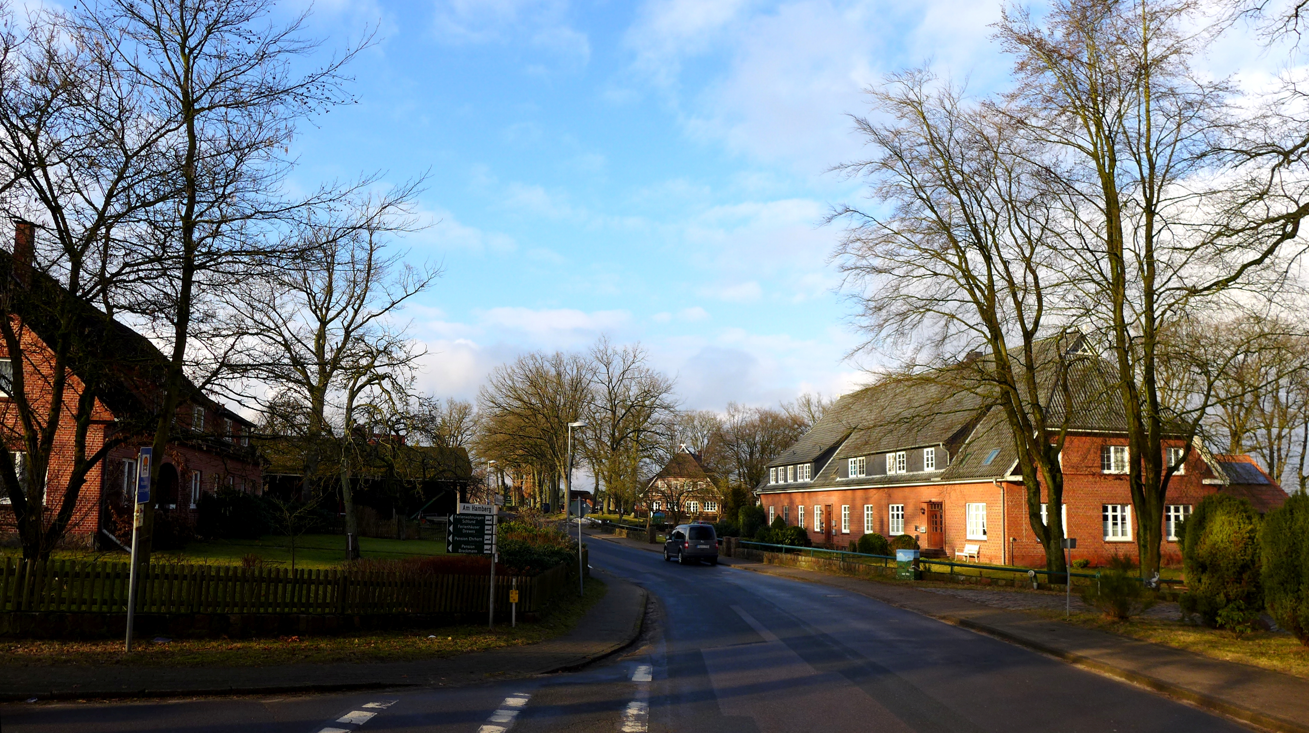 Dorfstraße "Am Naturschutzpark" in Ollsen, einem Ortsteil der Gemeinde Hanstedt (Nordheide). Aufnahmedatum 2017-02.